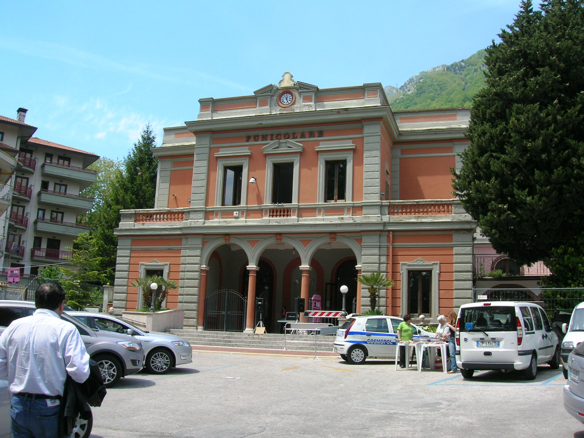 La stazione a valle della funicolare di Montevergine